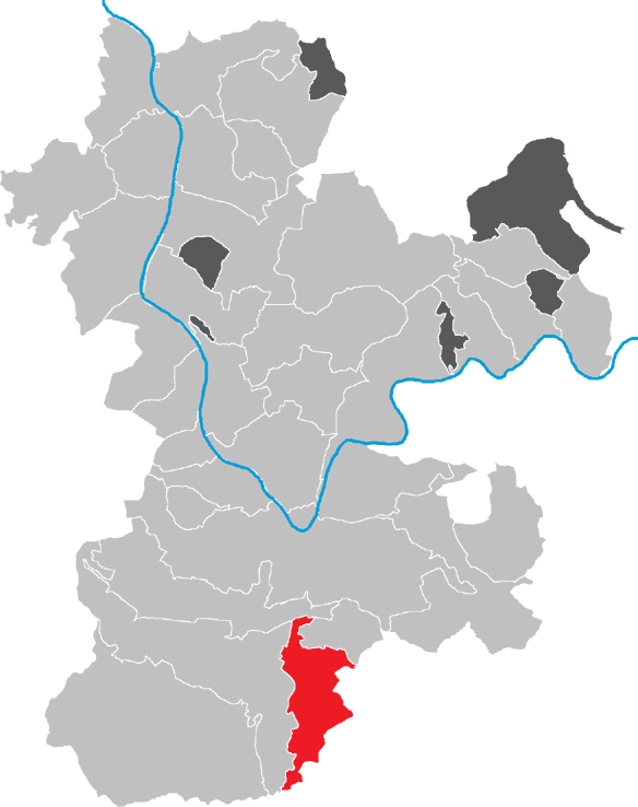 Karte von Schneeberg im Kreis Miltenberg, Bayern, Deutschland.